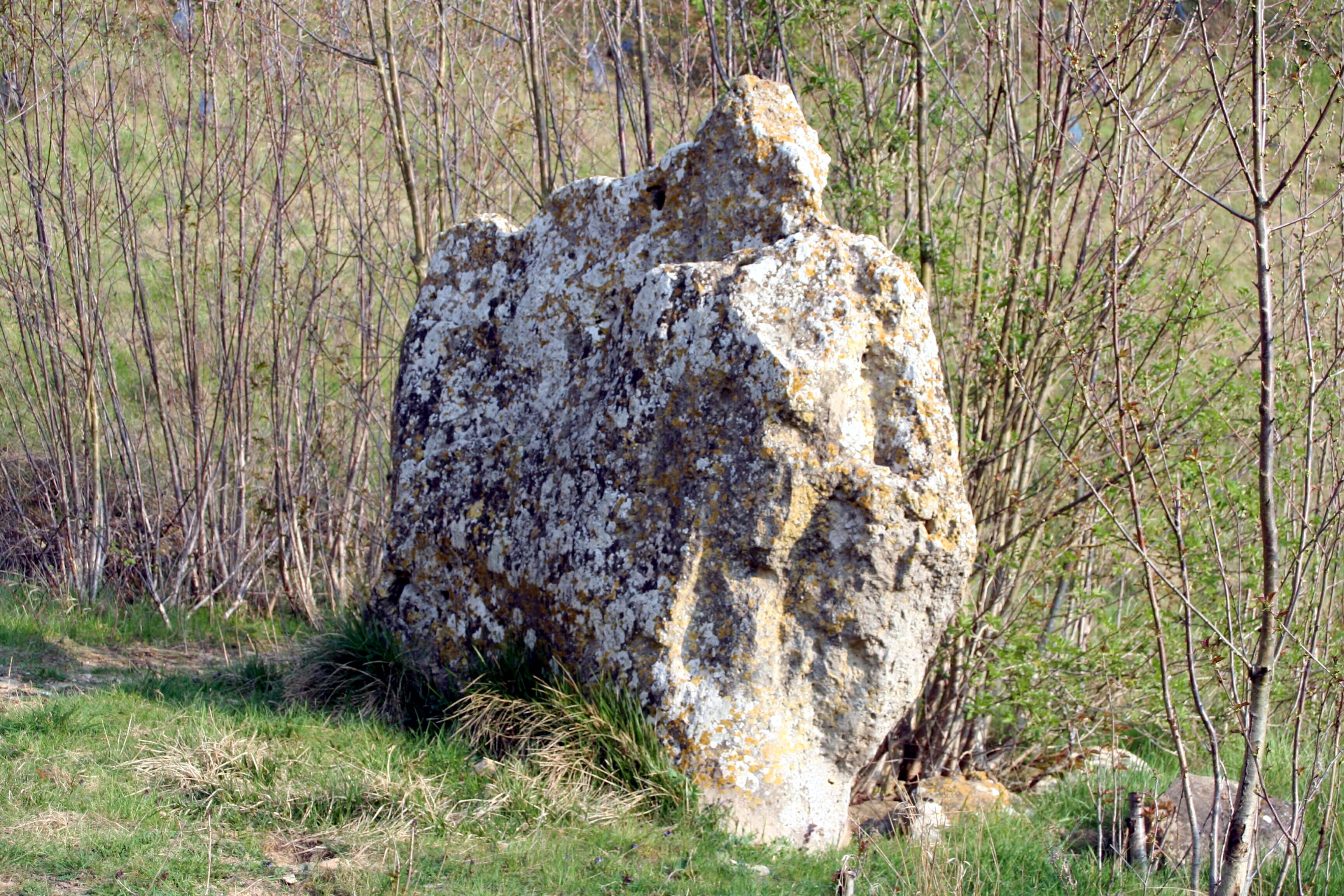 Menhir de la Pierre-Drette à Guitrancourt - Yvelines (France)